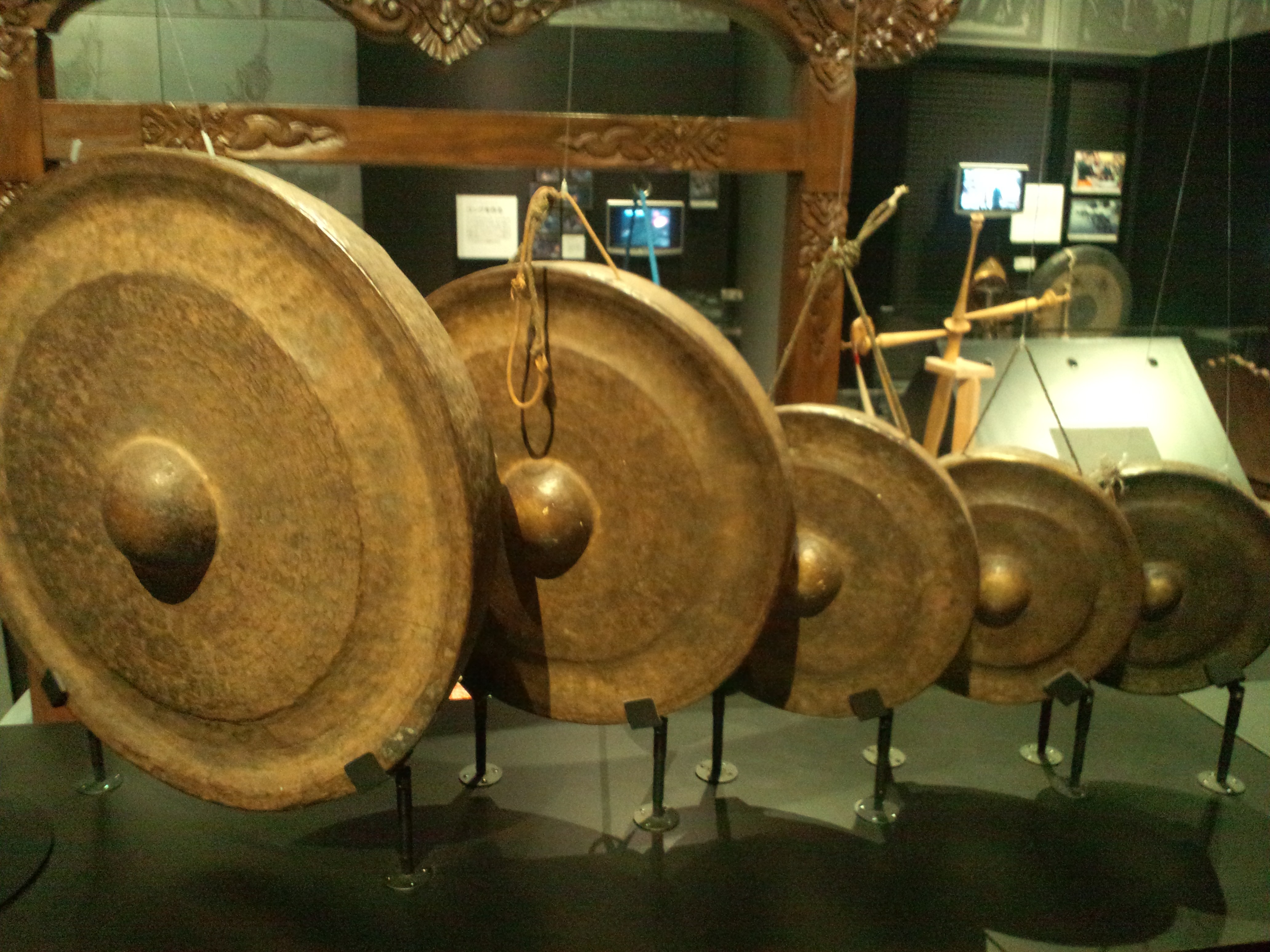 国立民族学博物館（大阪） コン（カンボジア、クルン族、2005年収集）